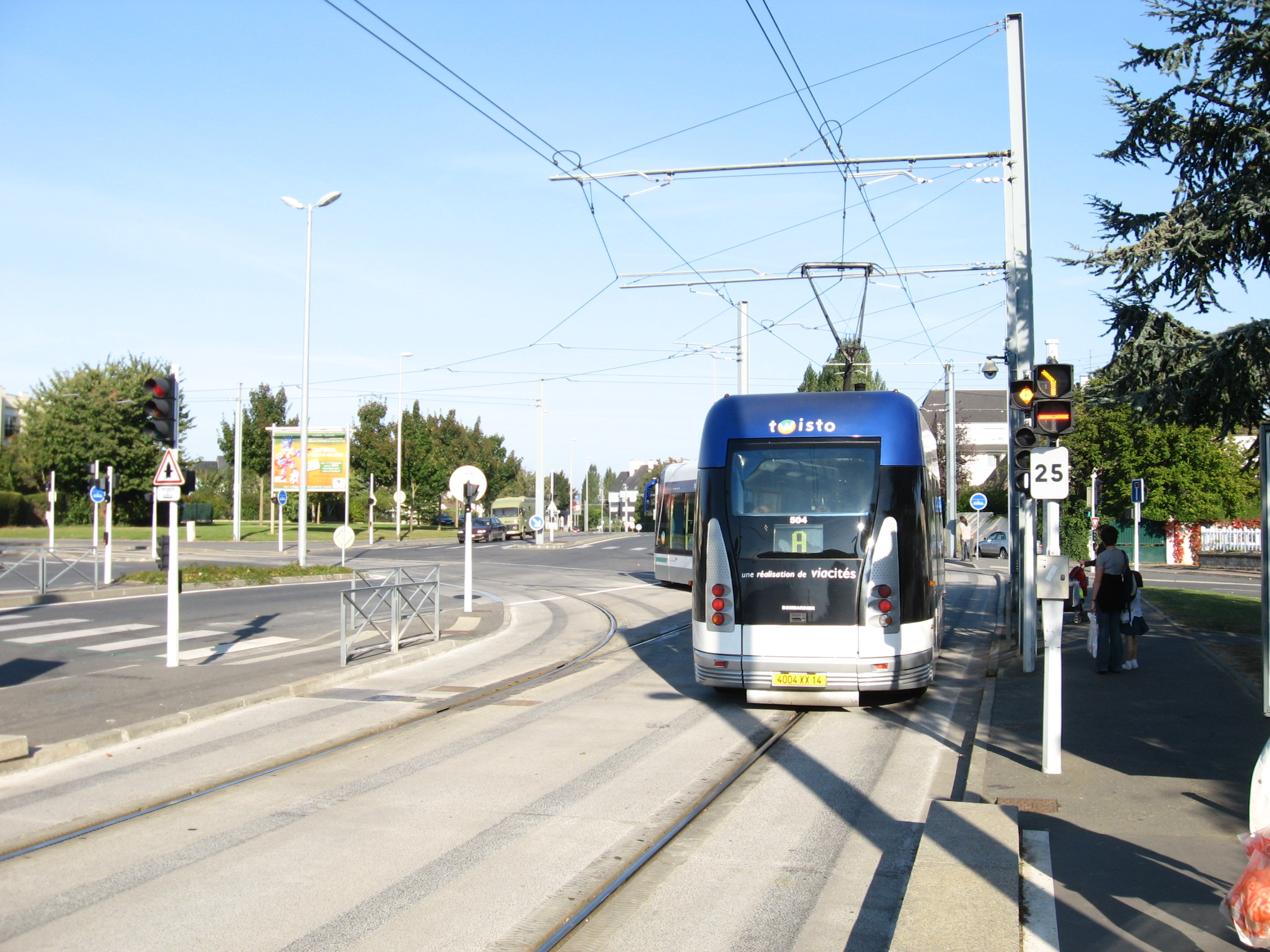 Rubberbandtram in Caen